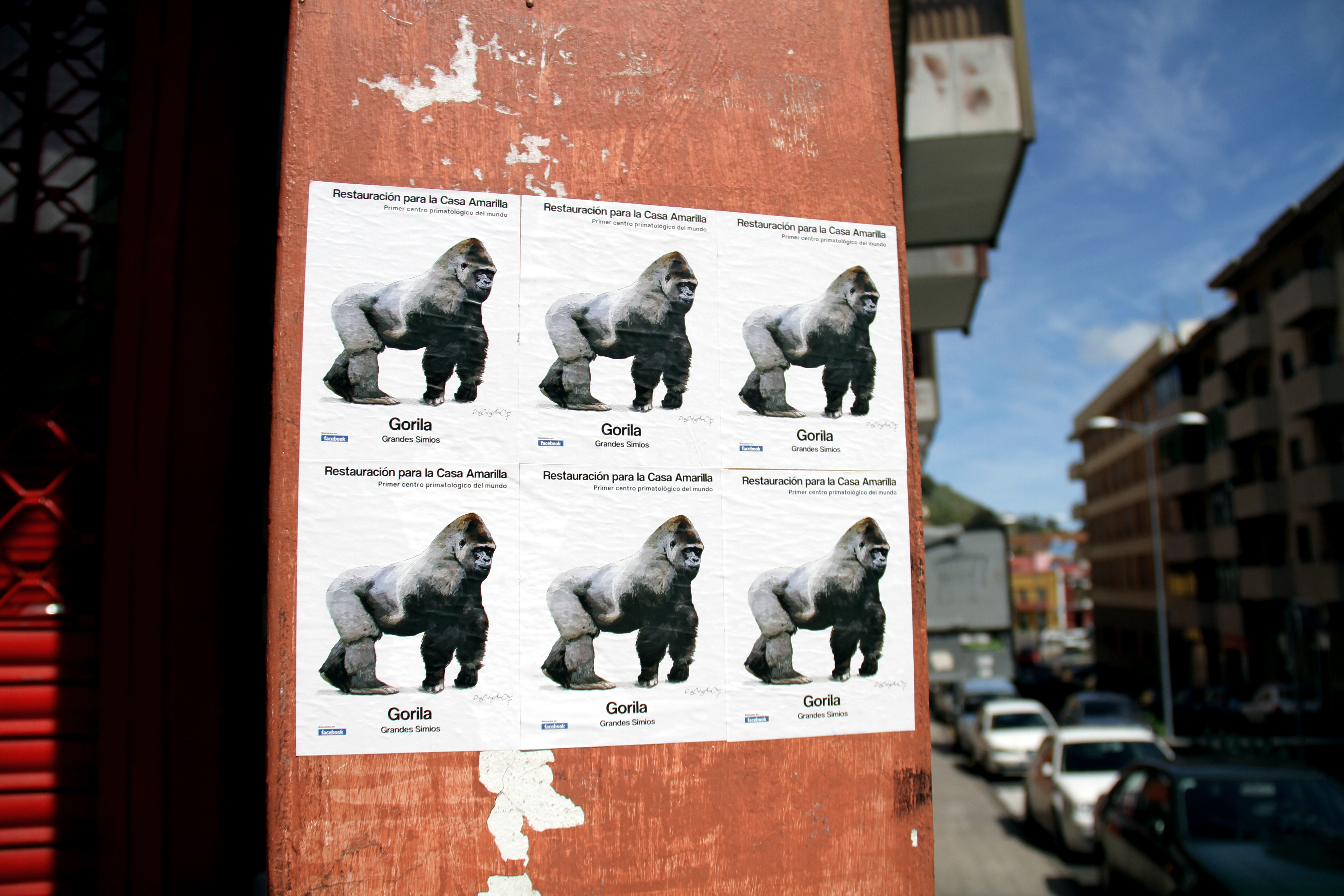 Publicidad, San Cristóbal de La Laguna.